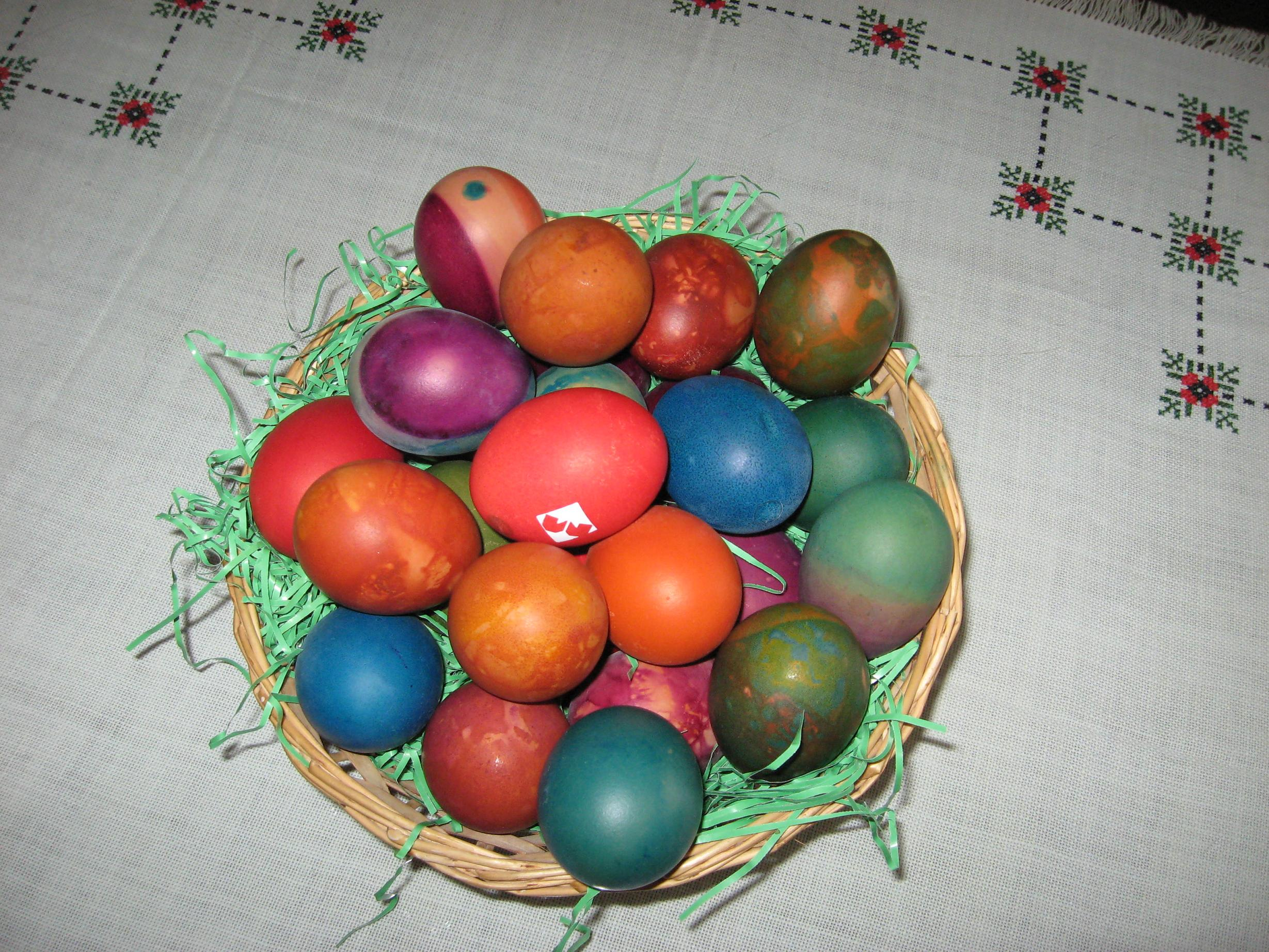 Драган Цветковић, сопствена слика.